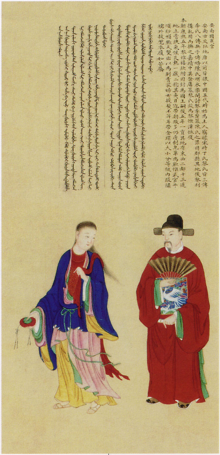 中文（香港）: 安南國夷官